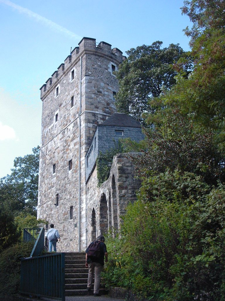 Aachen, sogenannter "Langer Turm"